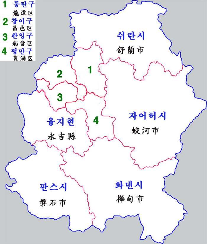 지린시 현급행정구역도